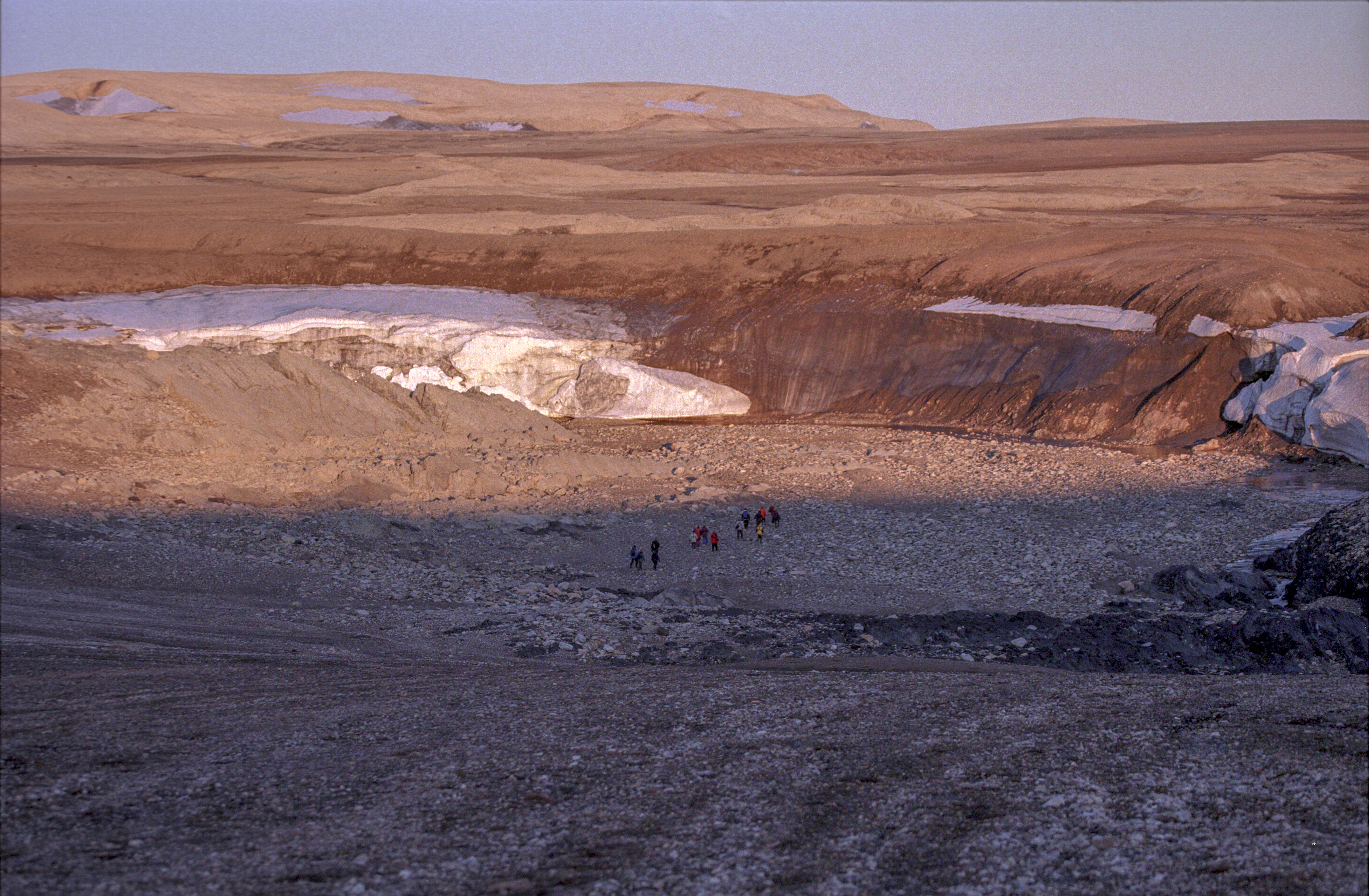 Svalbard, Nordastlandet